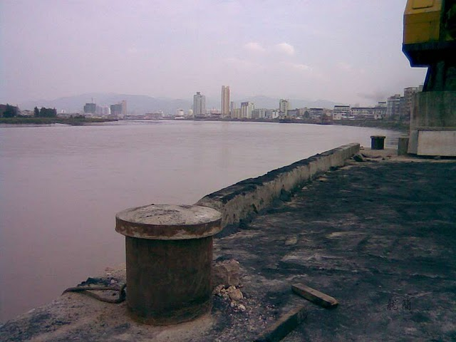 龙港大桥 - 外滩小码头